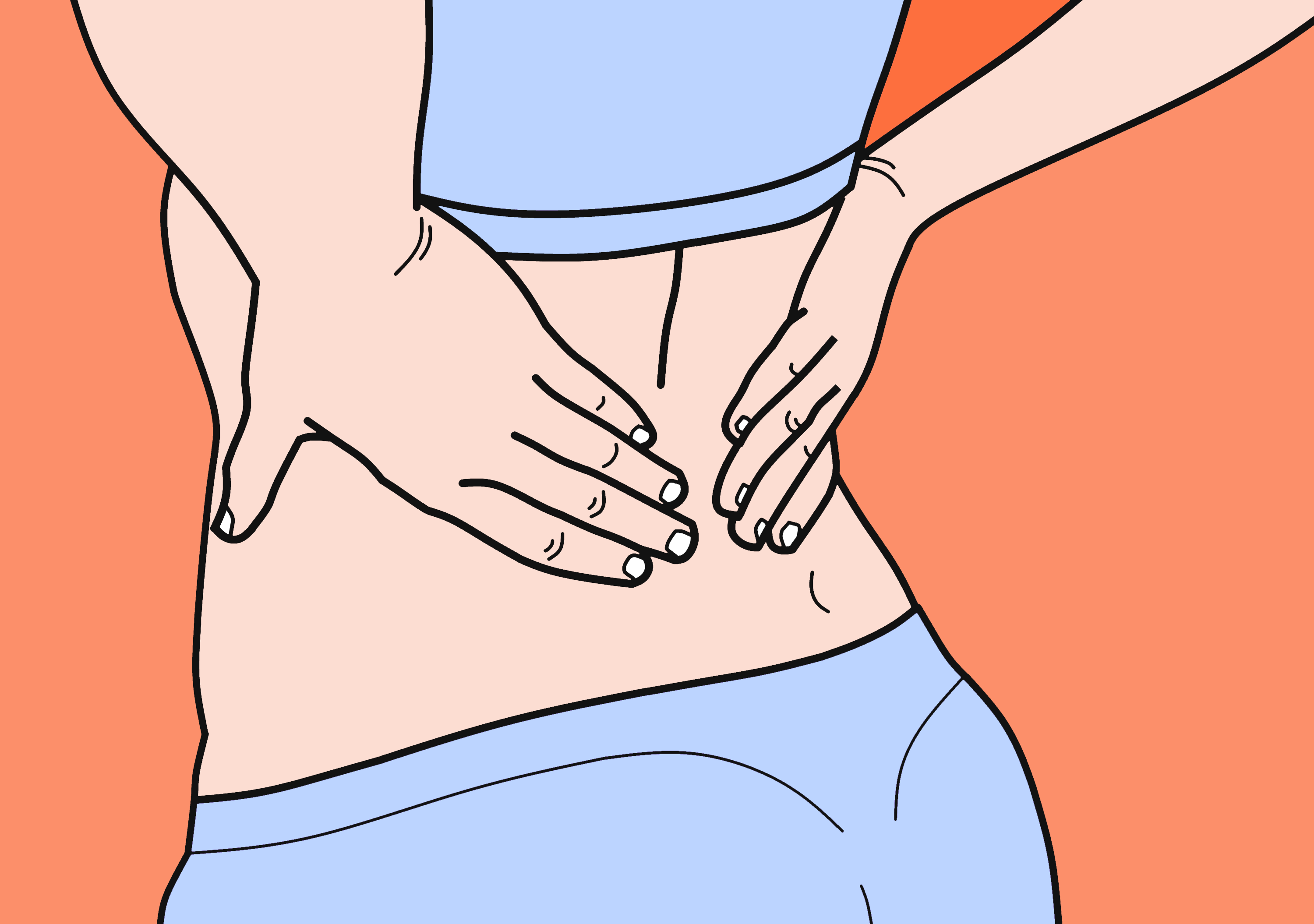 Litiasis, cólico nefrítico, cólico, dolor de espalda, cálculos renales, cintura, dolor lumbar.